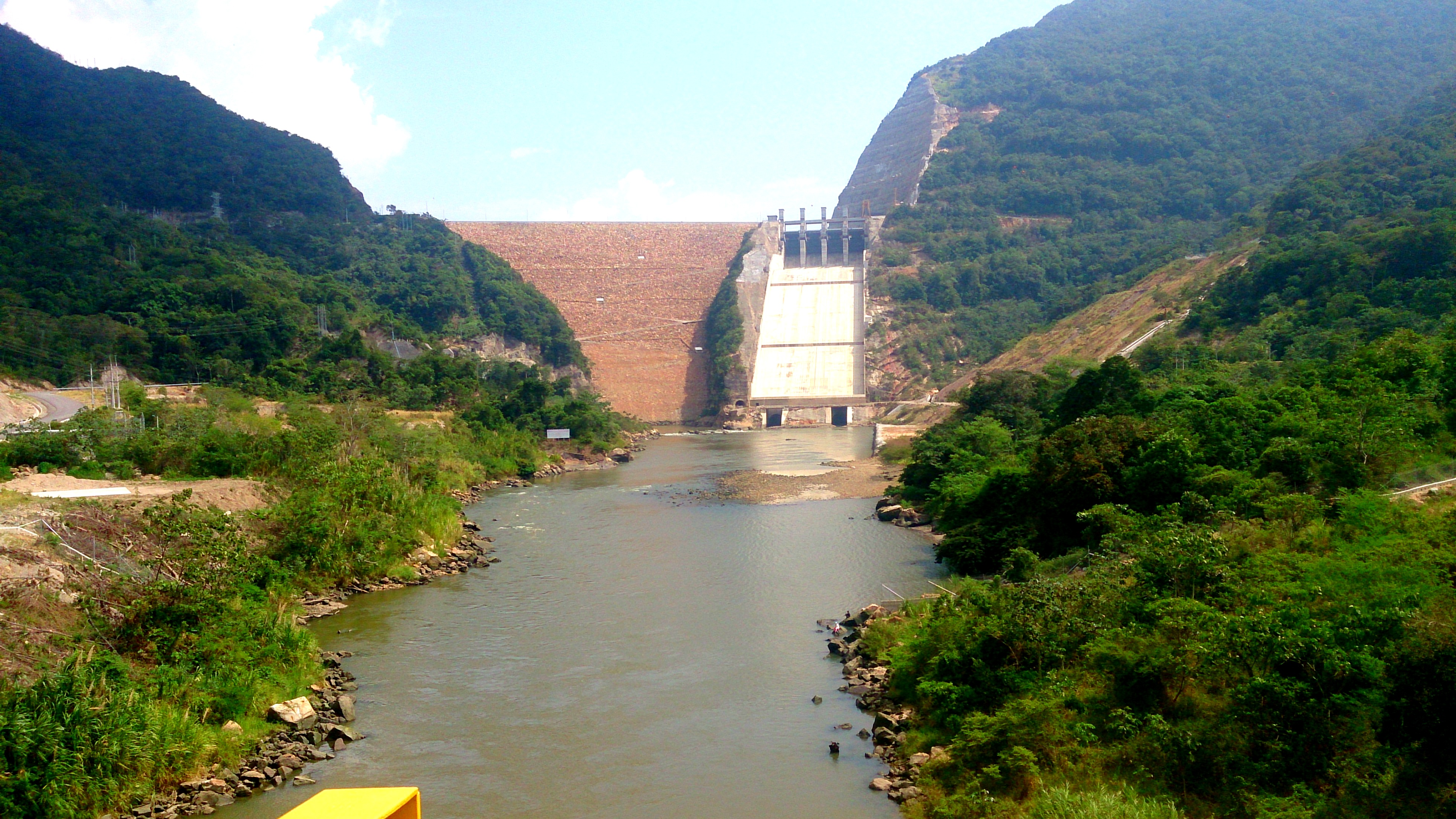 Esta fotografía fue tomada en el municipio colombiano con código 68307.